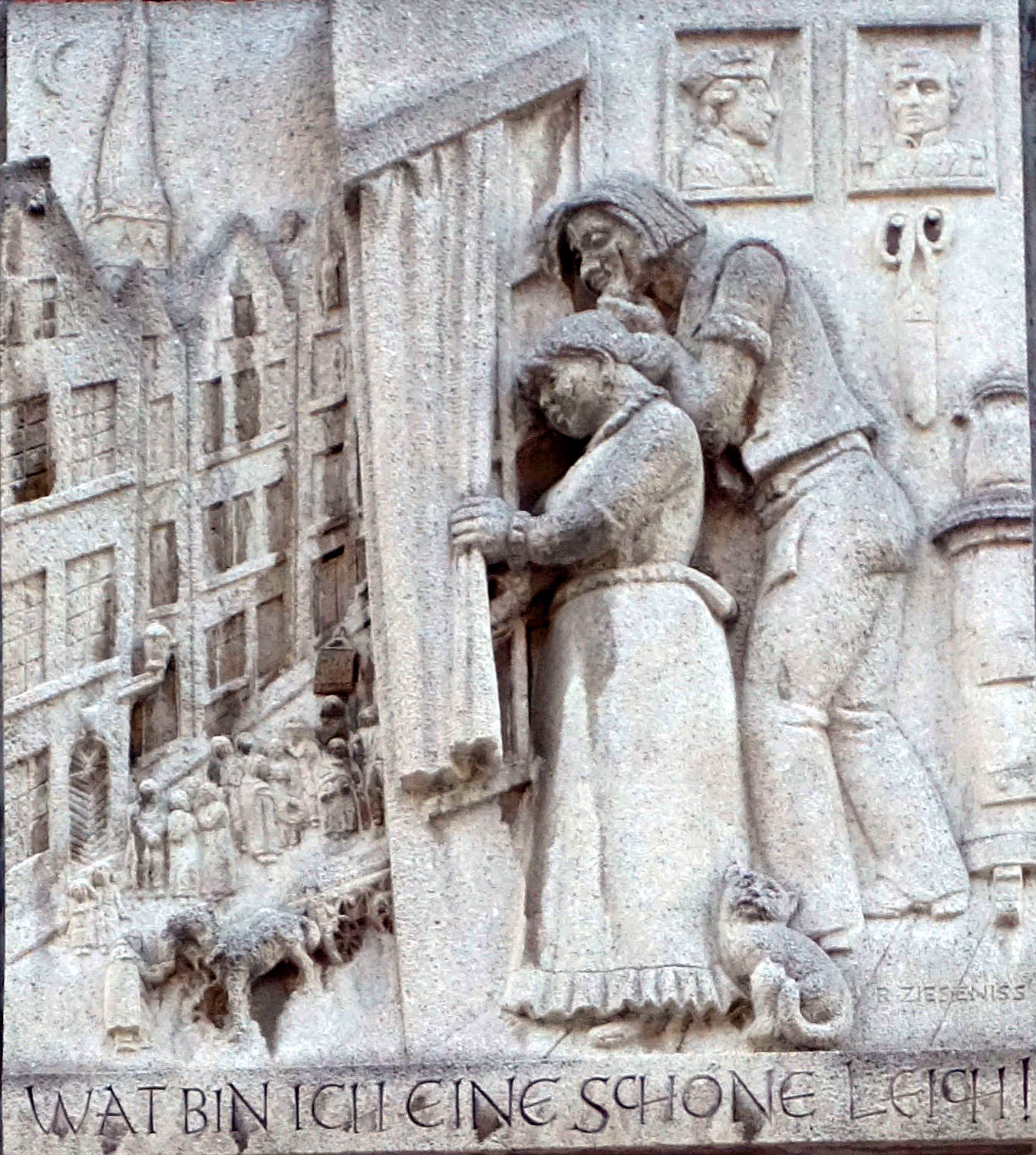 Schneider-Wibbel-Gasse in Düsseldorf, Oktober 2015. Relief am Schneider-Wibbel-Haus, Bolkerstraße, Wat bin ich eine schöne Leich! Darunter Porträts links: Thea Grodtzinsky in der Rolle der Frau Wibbel Mitte: Hans-Müller-Schlösser, Autor des Theaterstücks "Schneider Wibbel rechts: Paul Henckels in der Rolle des Wibbel